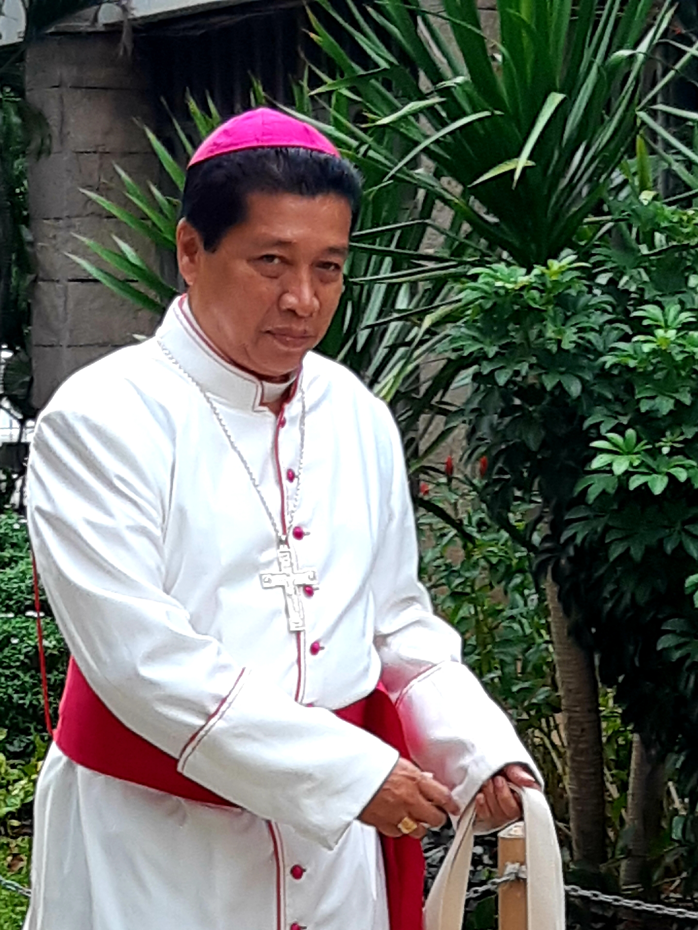 Uskup Purwokerto, Mgr Christophorus Tri Harsono.jpg